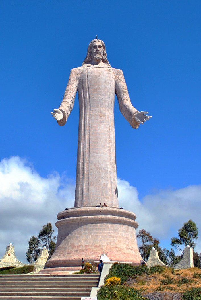 Cerro de Santa Apolonia en donde se encuentra la escultura a Cristo Rey en Pachuca de Soto